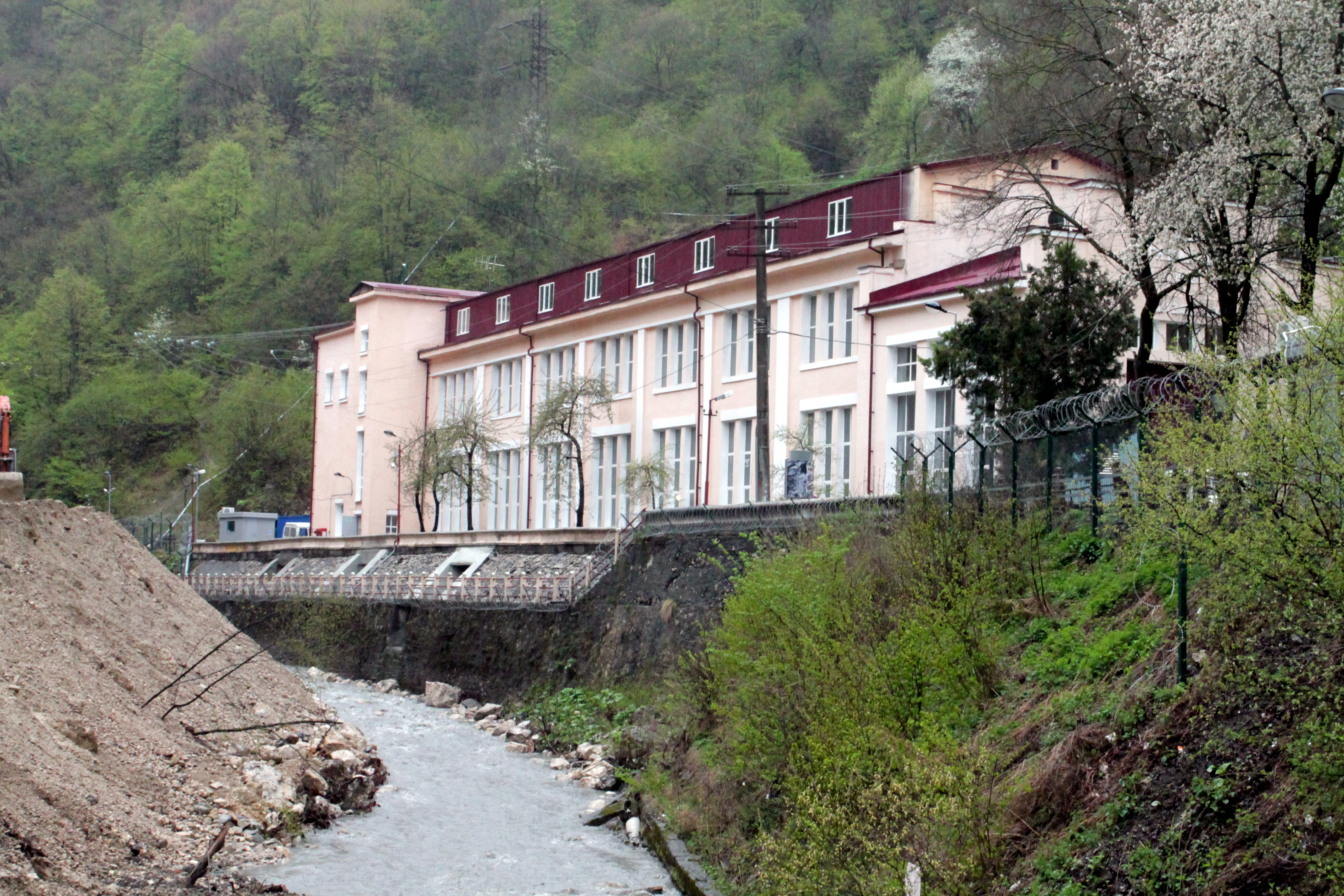 Здание Гизельдонской ГЭС